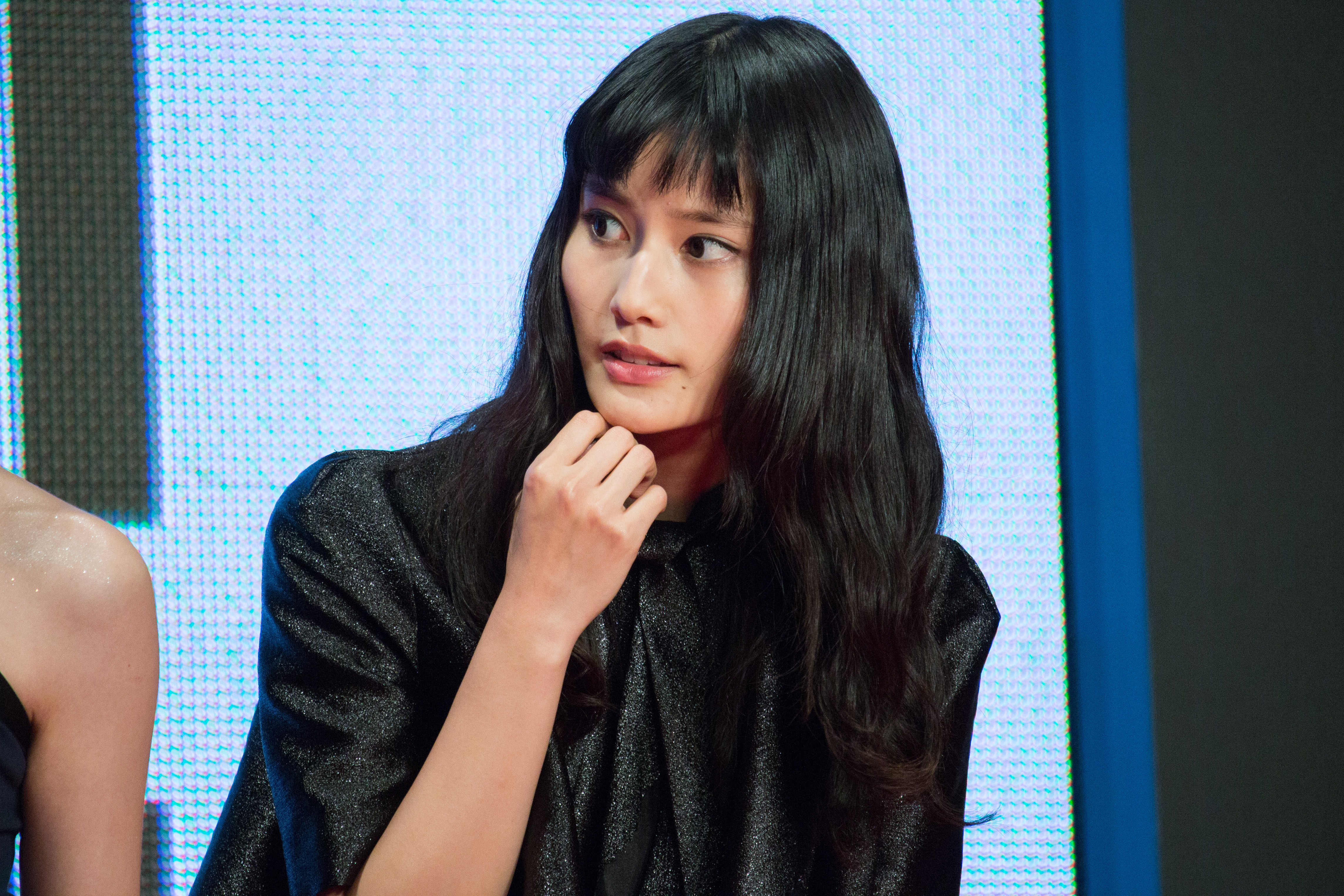 第28回 東京国際映画祭 オープニングセレモニー 橋本愛 (残穢 -住んではいけない部屋-)